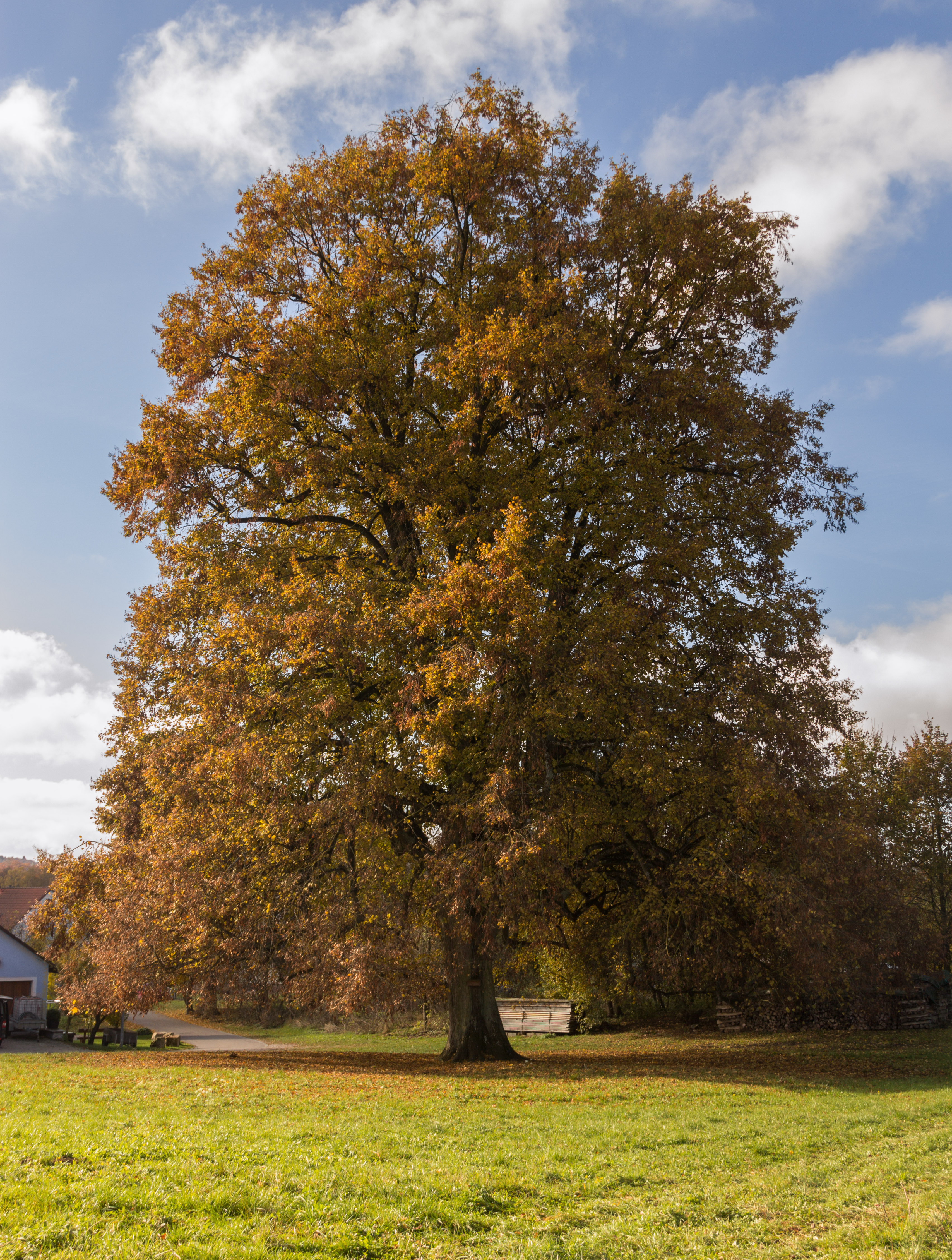 Deckerberger Linde, Deckersberg, Happurg, Naturdenkmal